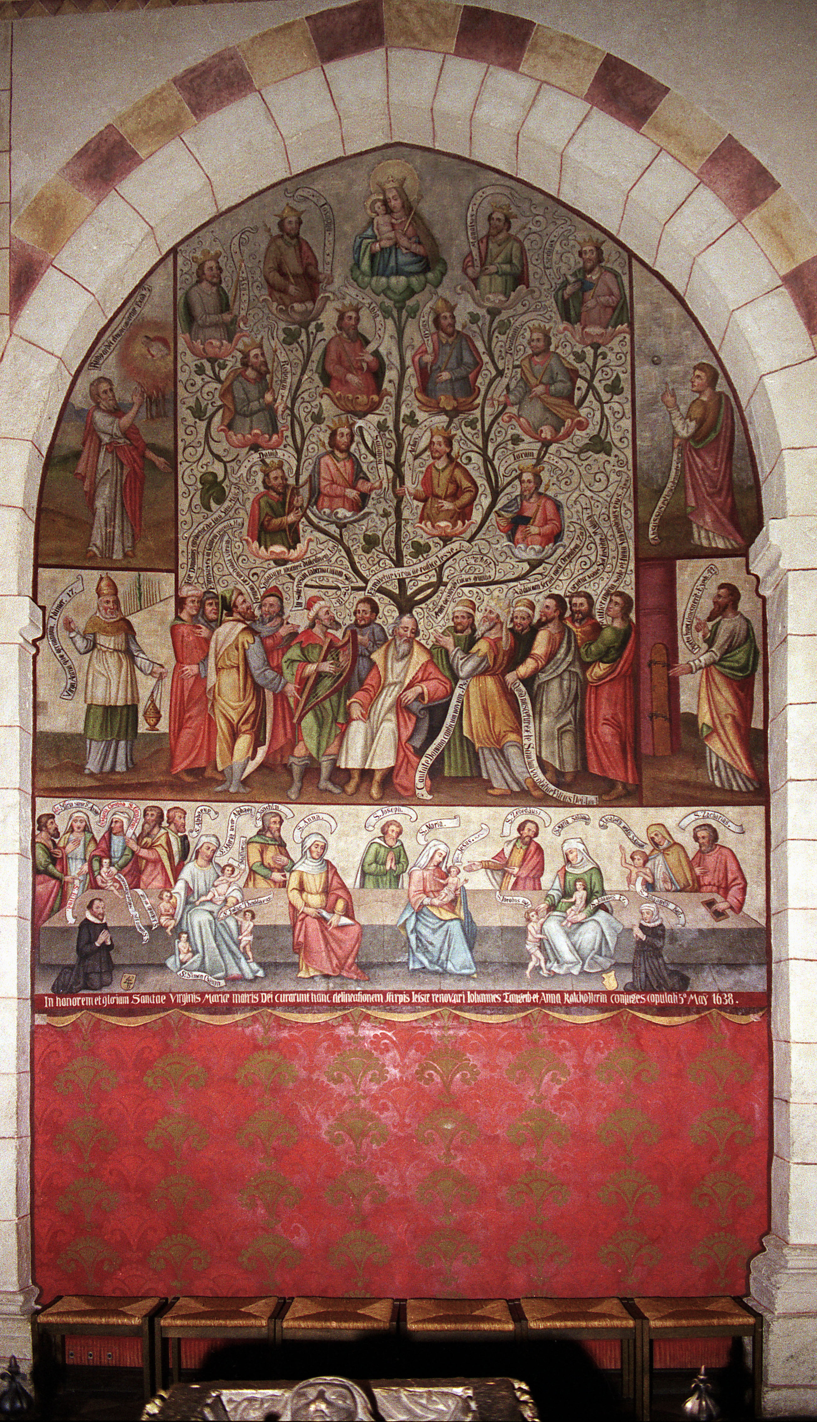 Wandgemälde der Ahnenreihe Jesu im Limburger Dom; unteres Register: Die heilige Sippe. Inschrift: In honorem et gloriam Sanctae Virginis Mariae matris Dei curarunt hanc delineationem stirpis Jessae renovari Johannes Landgerb et Anna Kalchorin conjuges copulatis 5. May 1638. In der untersten Reihe rechts, neben seiner Mutter Maria Salome auf dem Boden stehend, St. Jacobus maj. (der heilige Jakob d.Ä.). Limburger Dom, Querschiff